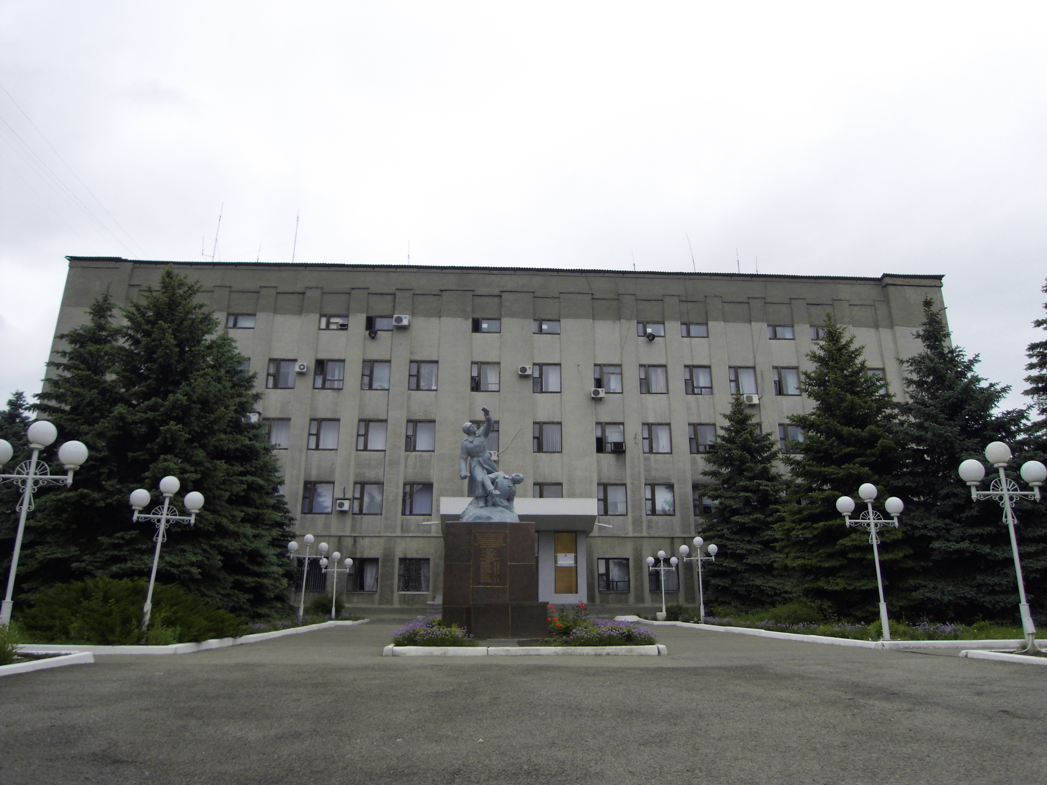 ДП Дзержинськвугілля